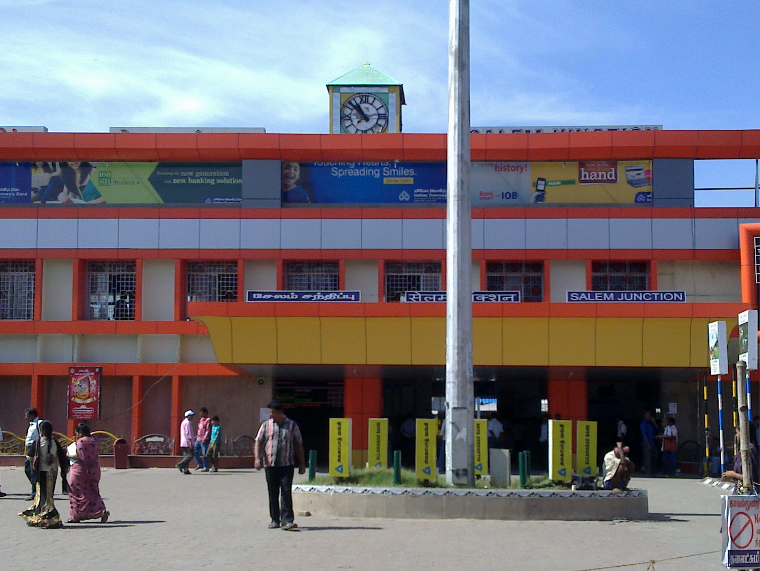 தென்னக ரயில்வே -சேலம் தொடர்வண்டி நிலையச் சந்திப்பு